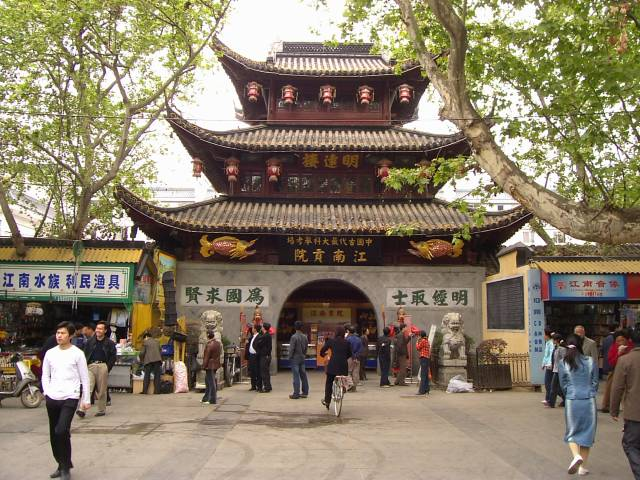 江南貢院 2004年4月15日撮影 撮影者:権作 参照：